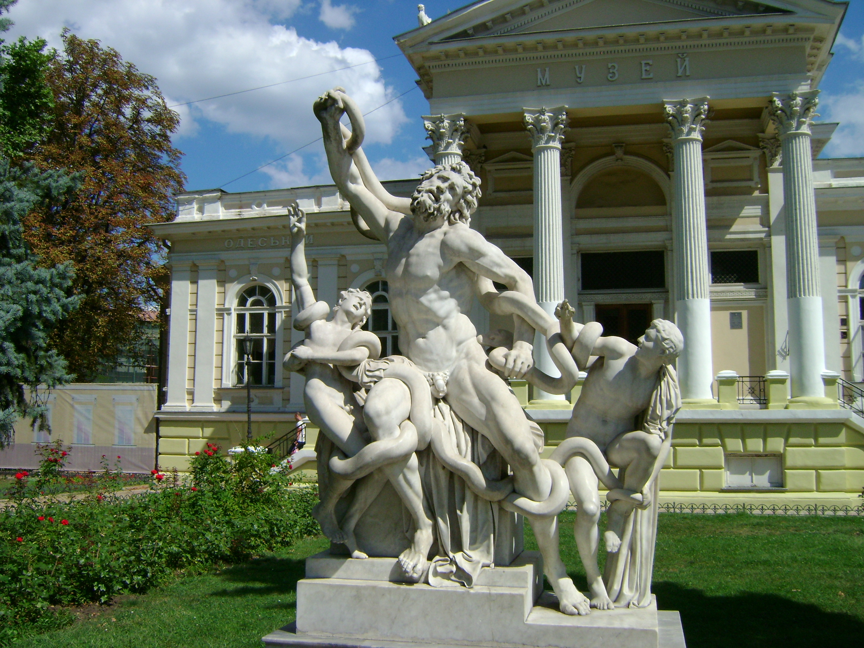 Скульптурна група “Лаокоон”, Одеса, Думська пл., 3